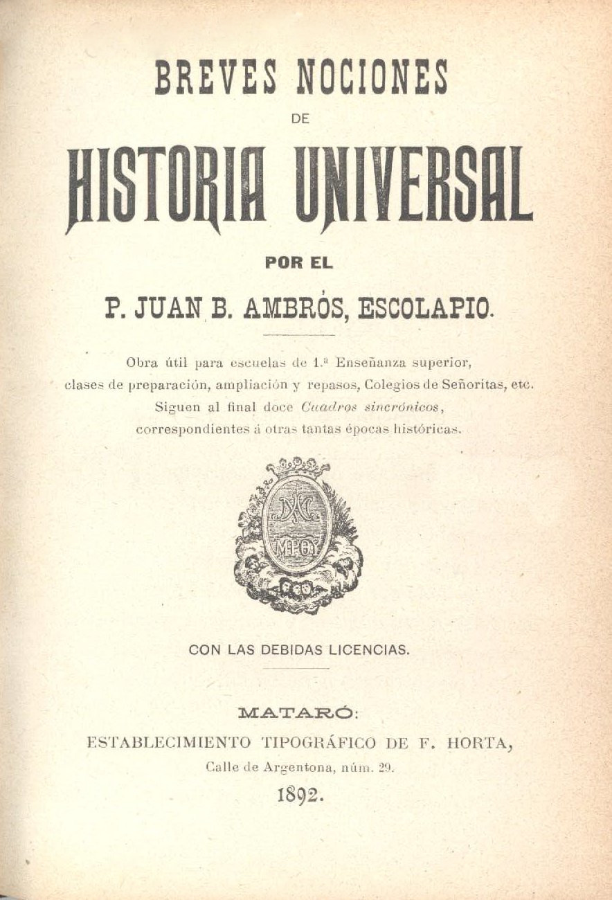 Portada del llibre Breves noticias de historia universal. Mataró: Establecimiento tipografico de F. Horta, 1892. Conservat a la biblioteca de l'Arxiu Provincial de l'Escola Pia de Catalunya, a Barcelona